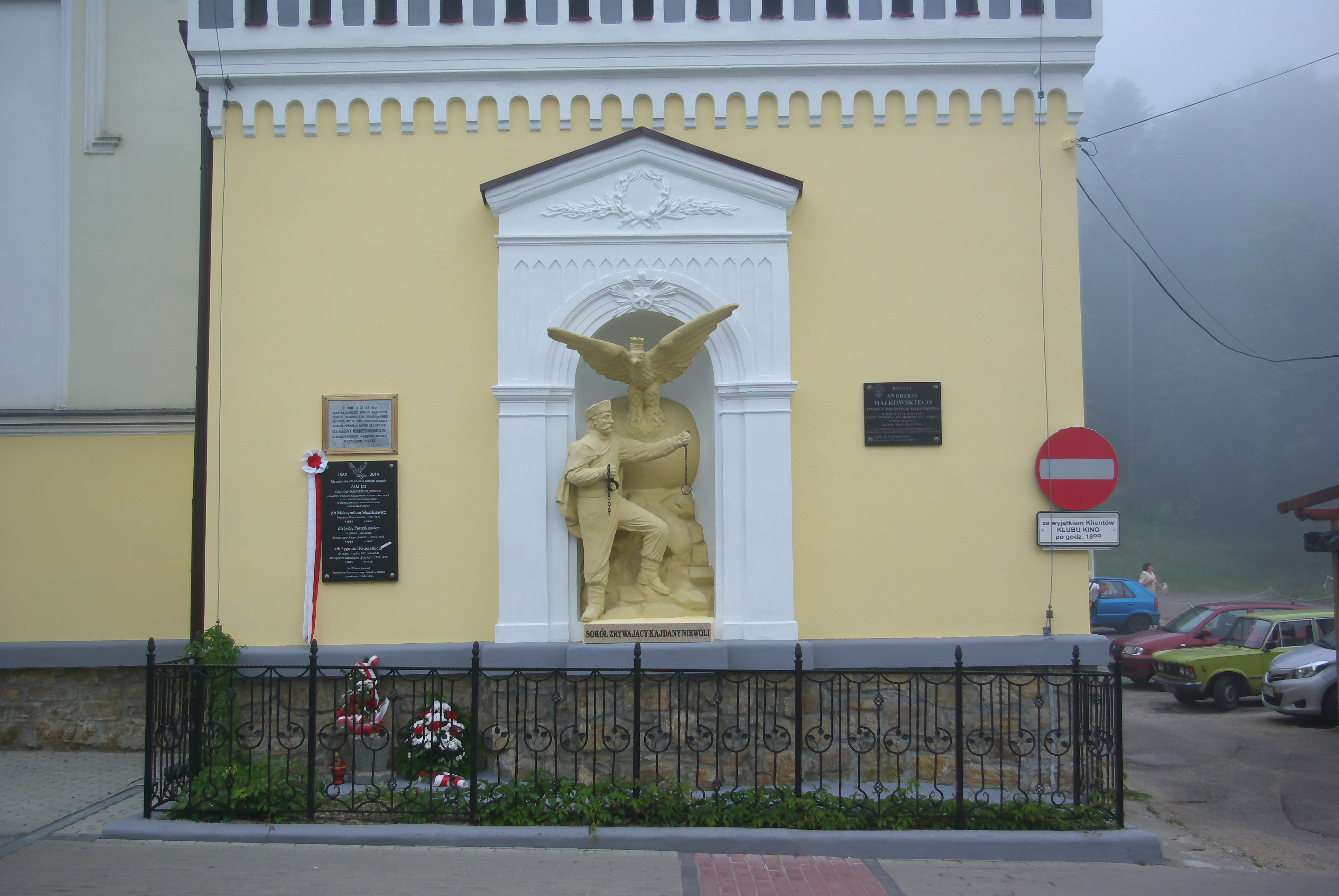 Elewacja wschodnia gmachu Polskiego Towarzystwa Gimnastycznego „Sokół” w Sanoku po uroczystościach 125-lecia w czerwcu 2014. Upamiętnienia